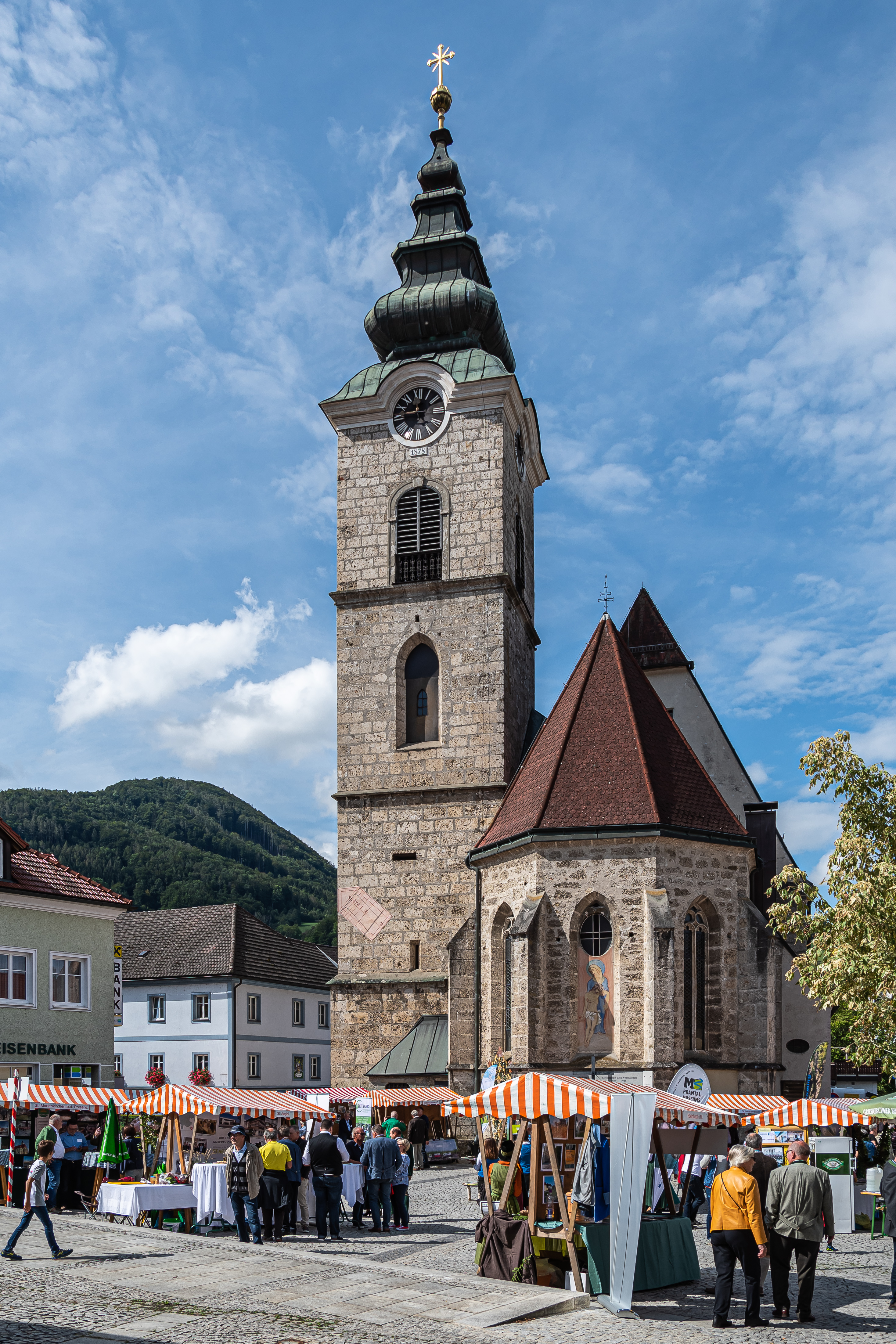 Der Kirchenplatz vor der denkmalgeschützten Pfarrkirche war das Zentrum der Ortsbildmesse 2019 in Ternberg. Kath. Pfarrkirche hll. Peter und Paul